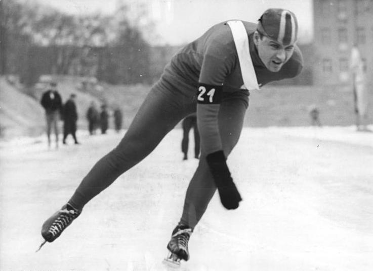 Helmut Kuhnert Zentralbild Kohls 16.3.1963 Deutsche Meisterschaften im Eisschnellauf..am 16. und 17.3.1963 auf der neuerbauten 400-m-Kunsteisbahn im Dynamo-Sportforum in Berlin mit Gästen aus Rumänien und Österreich. UBz: Helmut Kuhnert (SC Dynamo Berlin) während seines siegreichen 5000-m-Laufes. Abgebildete Personen: Kuhnert, Helmut: Eisschnelläufer, Olympiateilnehmer 1956, Trainer, DDR